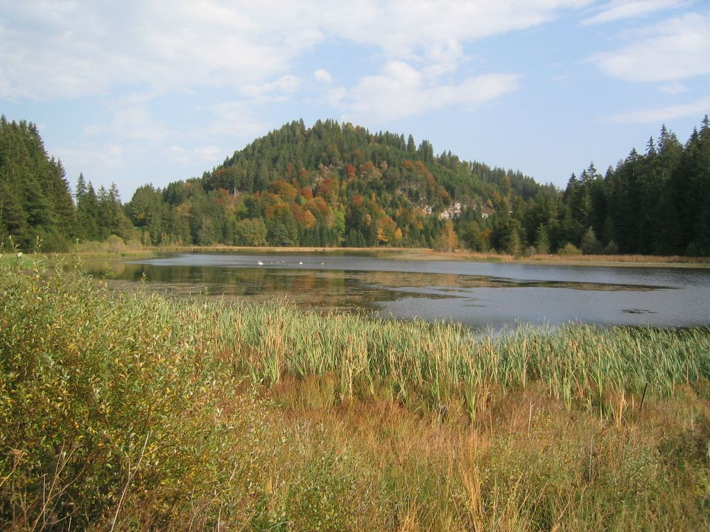 Der Schlossweiher bei Schweinegg (Gemeinde Eisenberg (Ostallgäu)